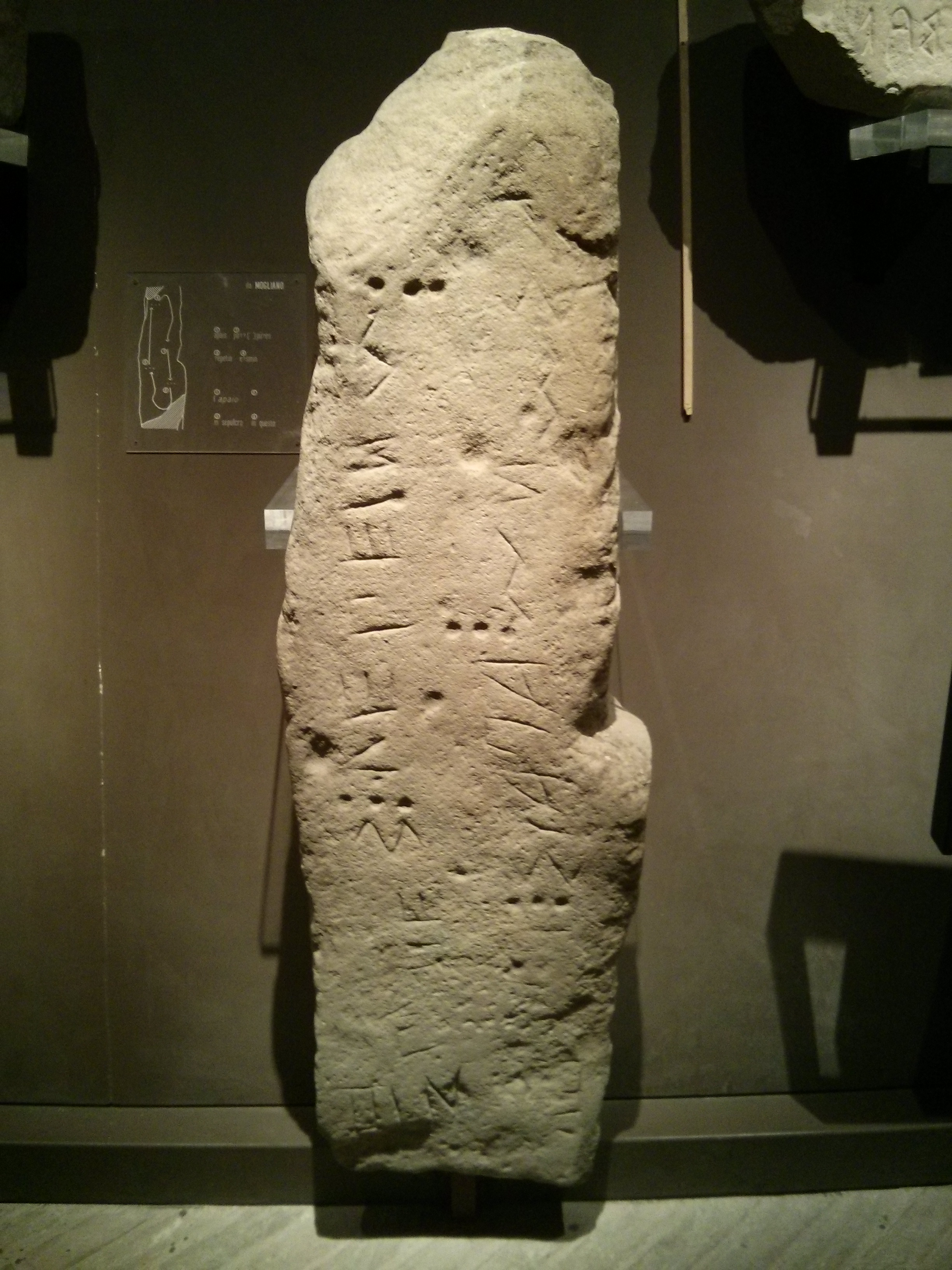 Iscrizioni picene - Stele di Mogliano Museo archeologico nazionale delle Marche Native nameMuseo archeologico nazionale delle MarcheLocationAncona, Marche, ItalyCoordinates43° 37′ 23.39″ N, 13° 30′ 39.38″ E Established1863 Web page control : Q3867709 VIAF: 130879044 ISNI: 0000 0001 2158 0954 LCCN: nr97041772 SUDOC: 027703002 WorldCat institution QS:P195,Q3867709